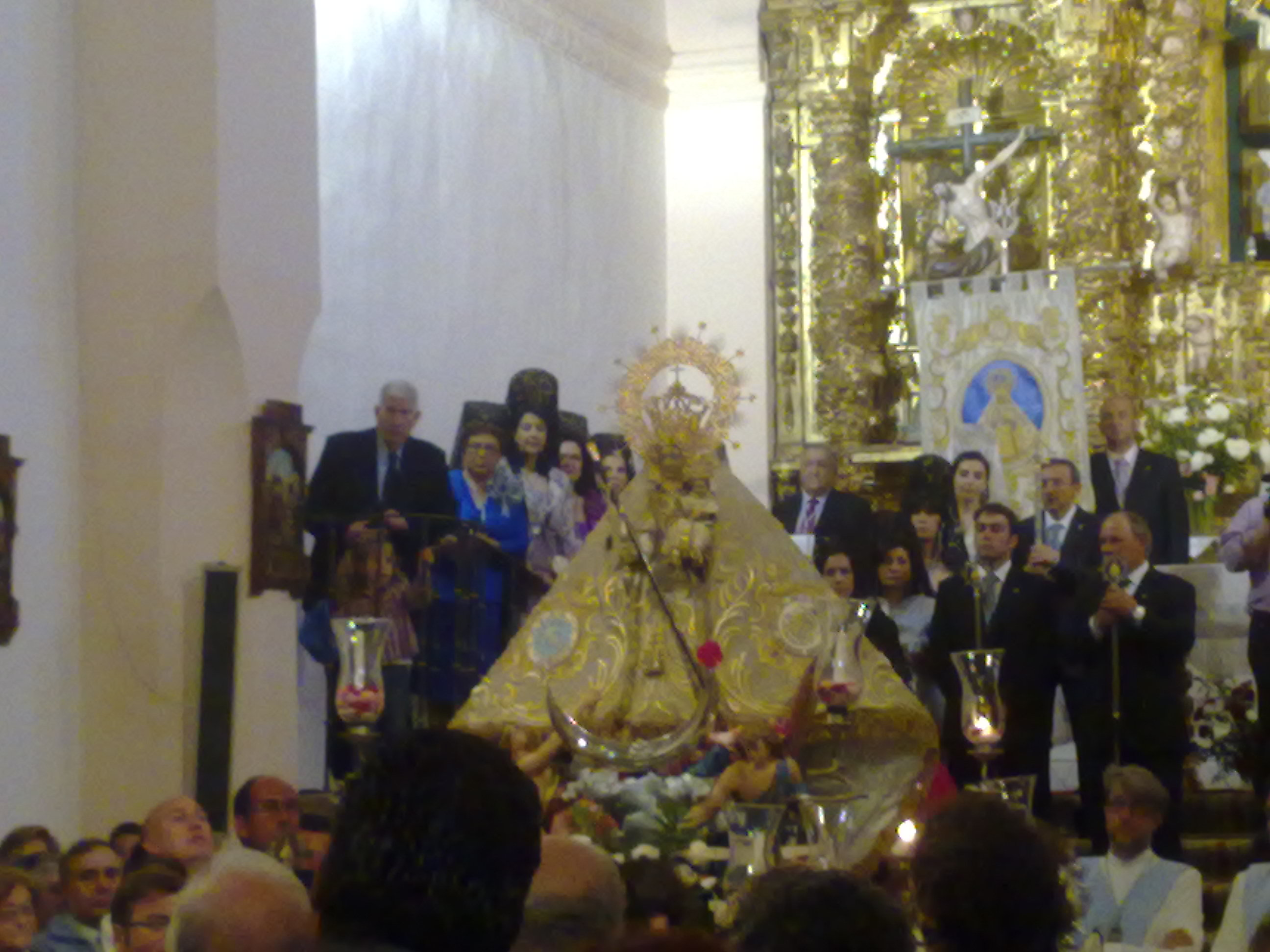 Virgen de Argeme en el Convento Madre de Dios el día de la Solemne procesión